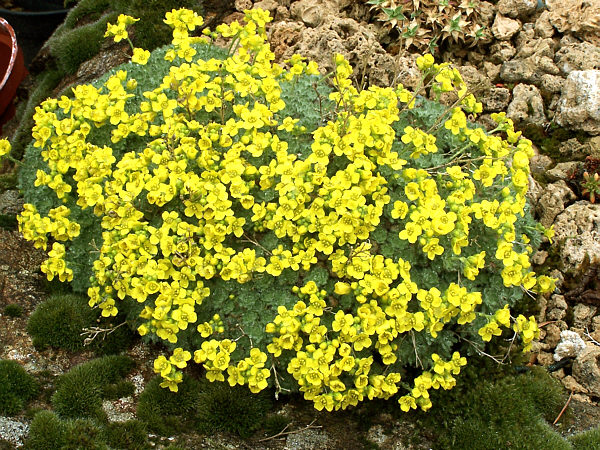 Plante en coussin de la Chine (Yunnan) de 7 à 10 cm sur parois rocheuses. (photo en culture)